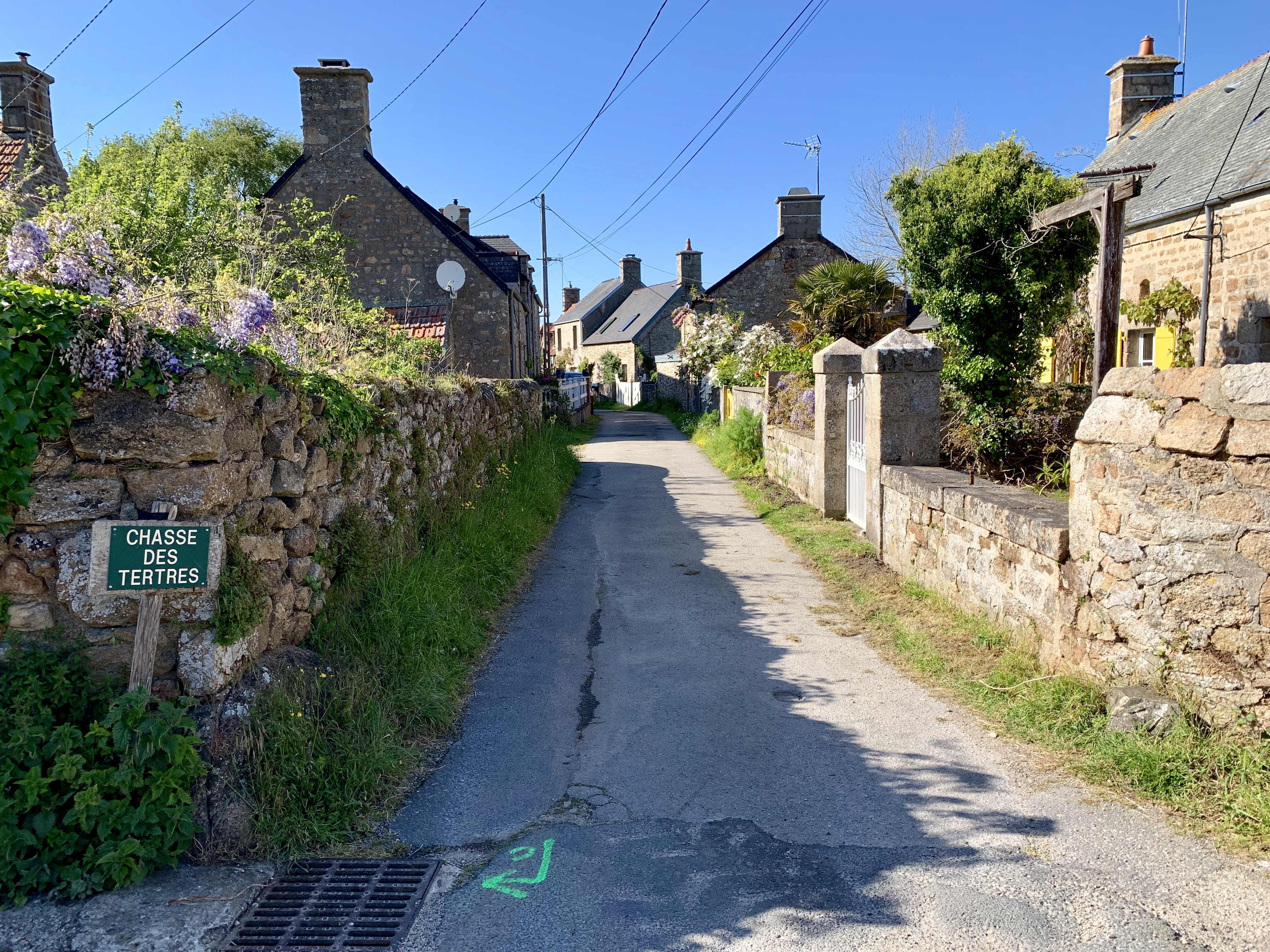 Hameau du Montéreire, à Fermanville, Normandie